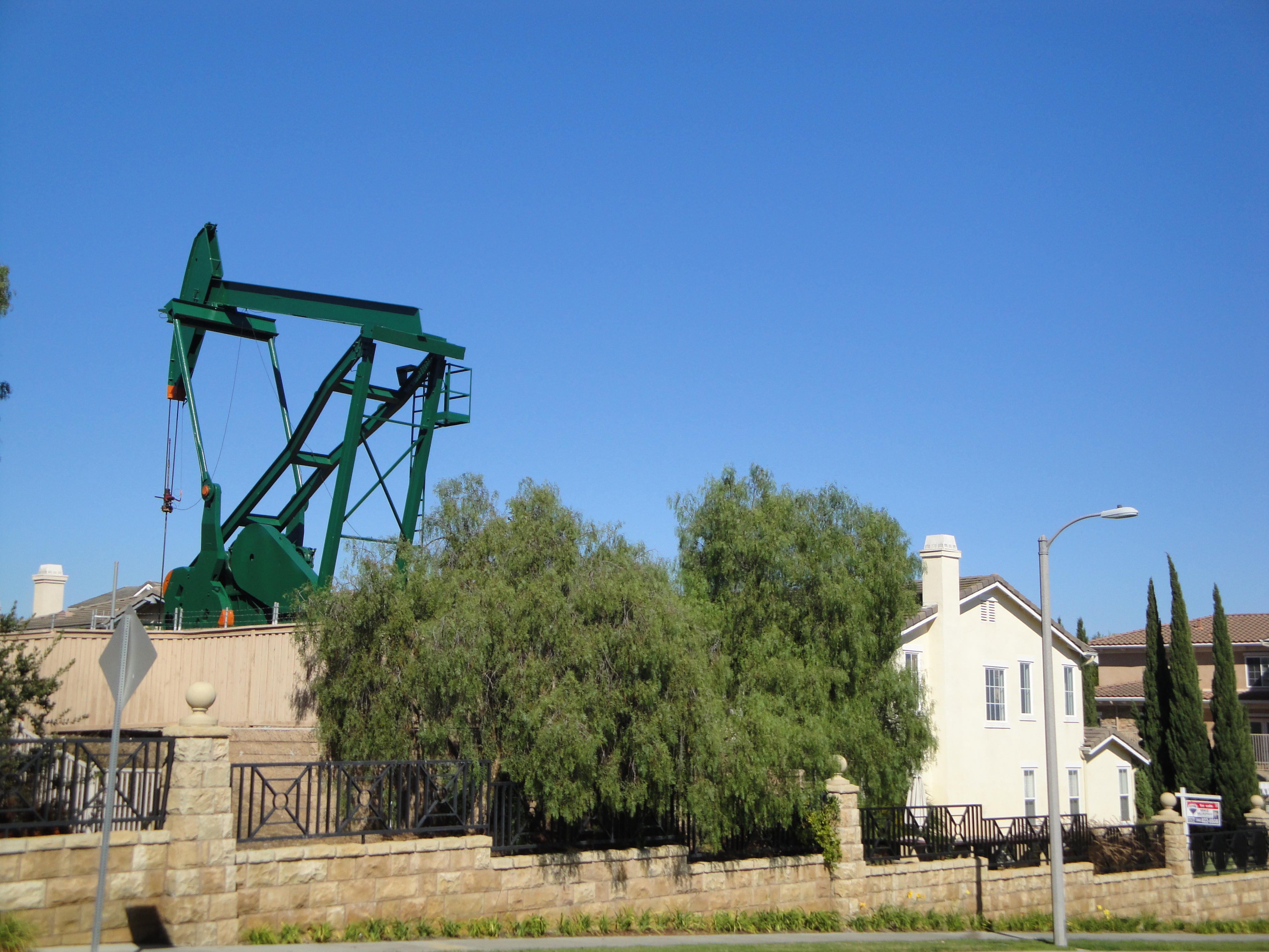 Signal Hill